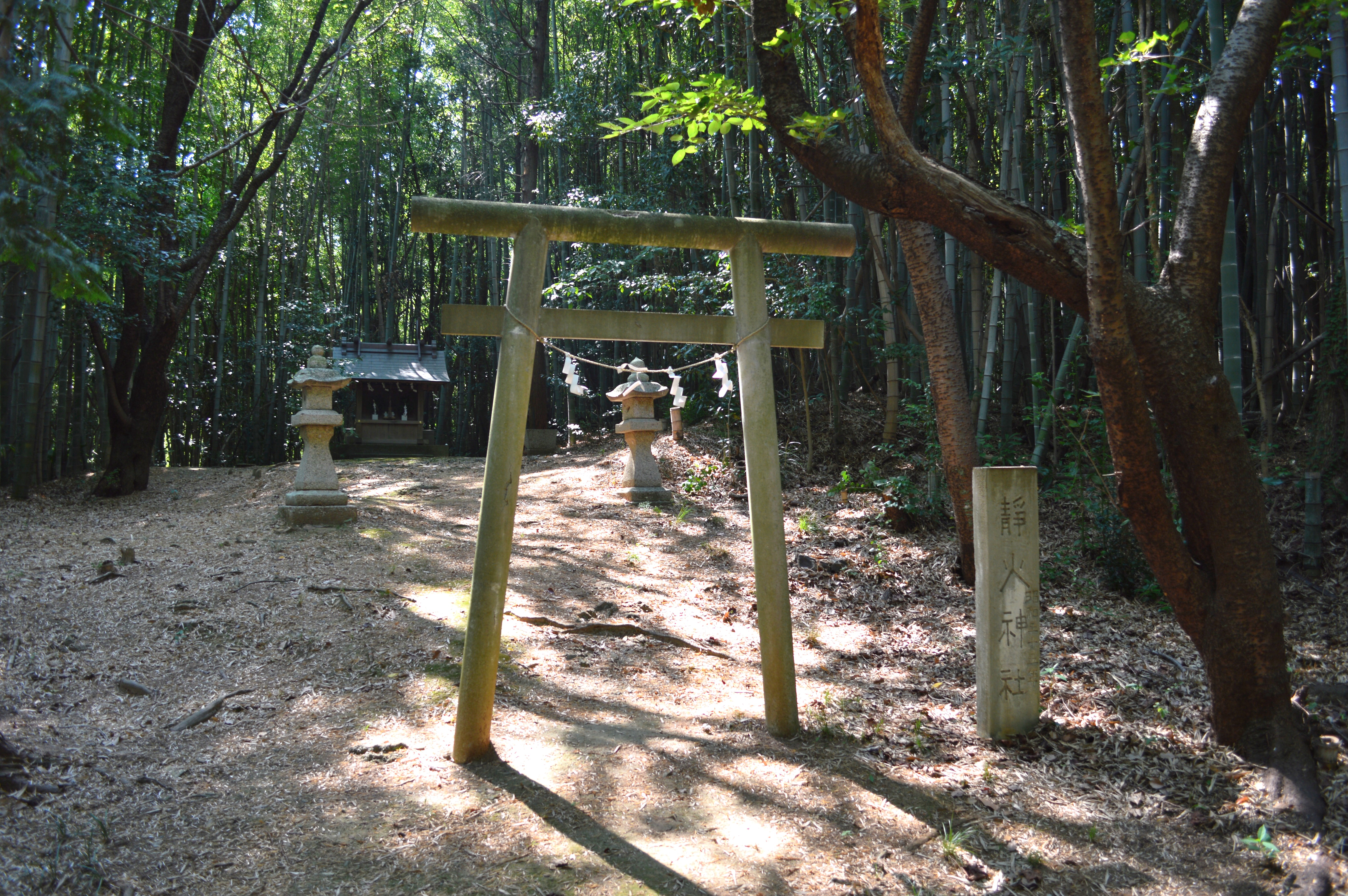 竃山神社境外摂社 静火神社